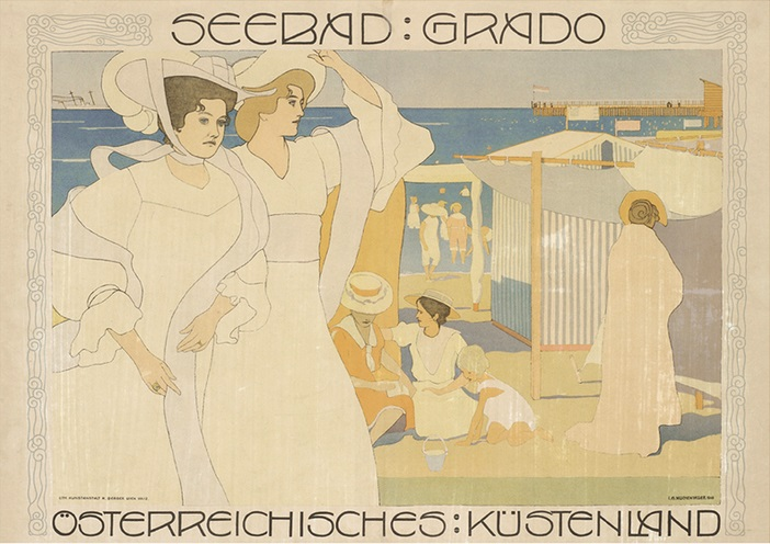 Poster pubblicitario "Seebad Grado", litografia